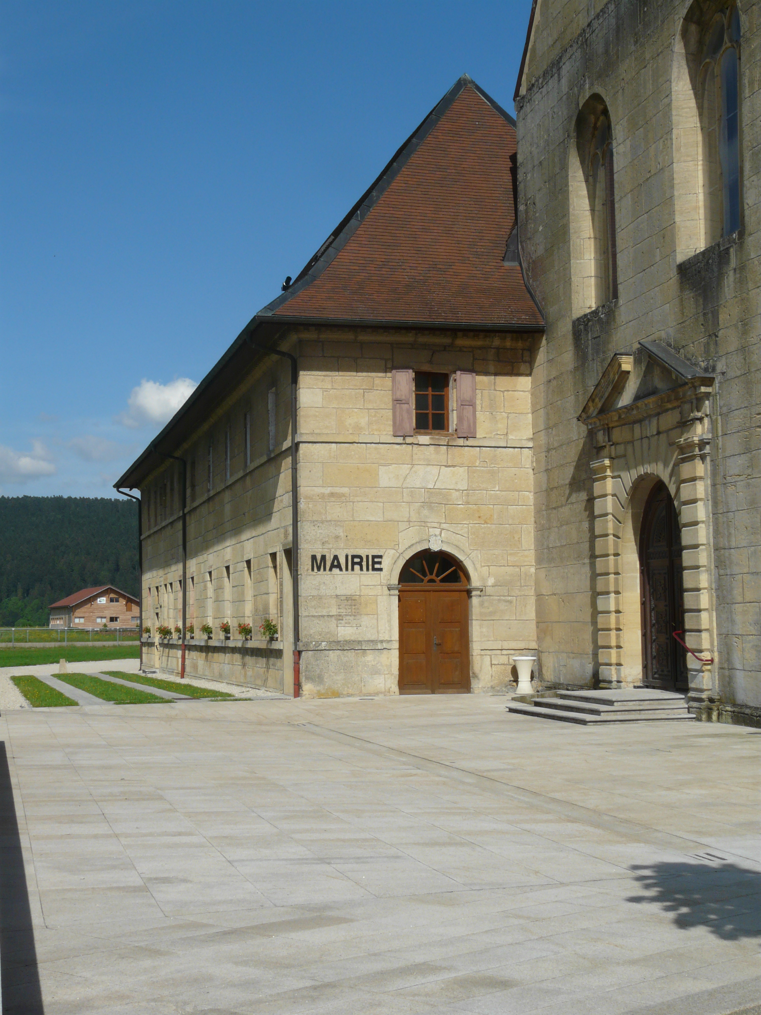 La mairie de Montlebon